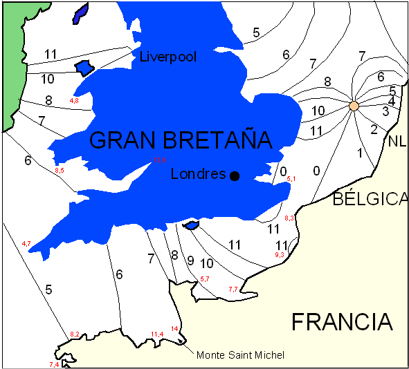 Cotidal lines and tides height in english channel. Lineas cotidales y altura de mareas en la Mancha. 2007